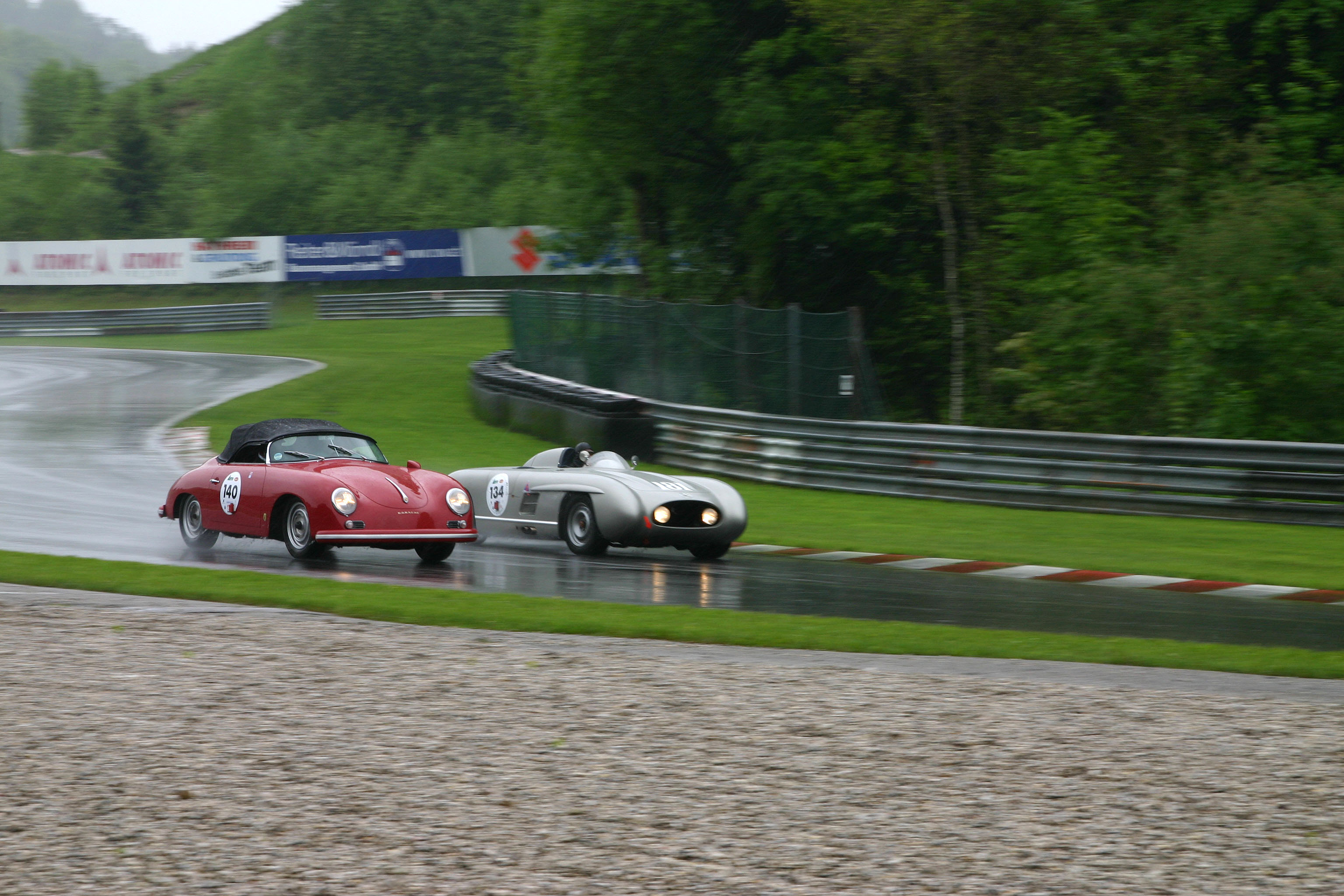 Porsche 356 Speedster and 300SL Porter Spezial at Gaisbergrennen 2006 at the Salzburgring